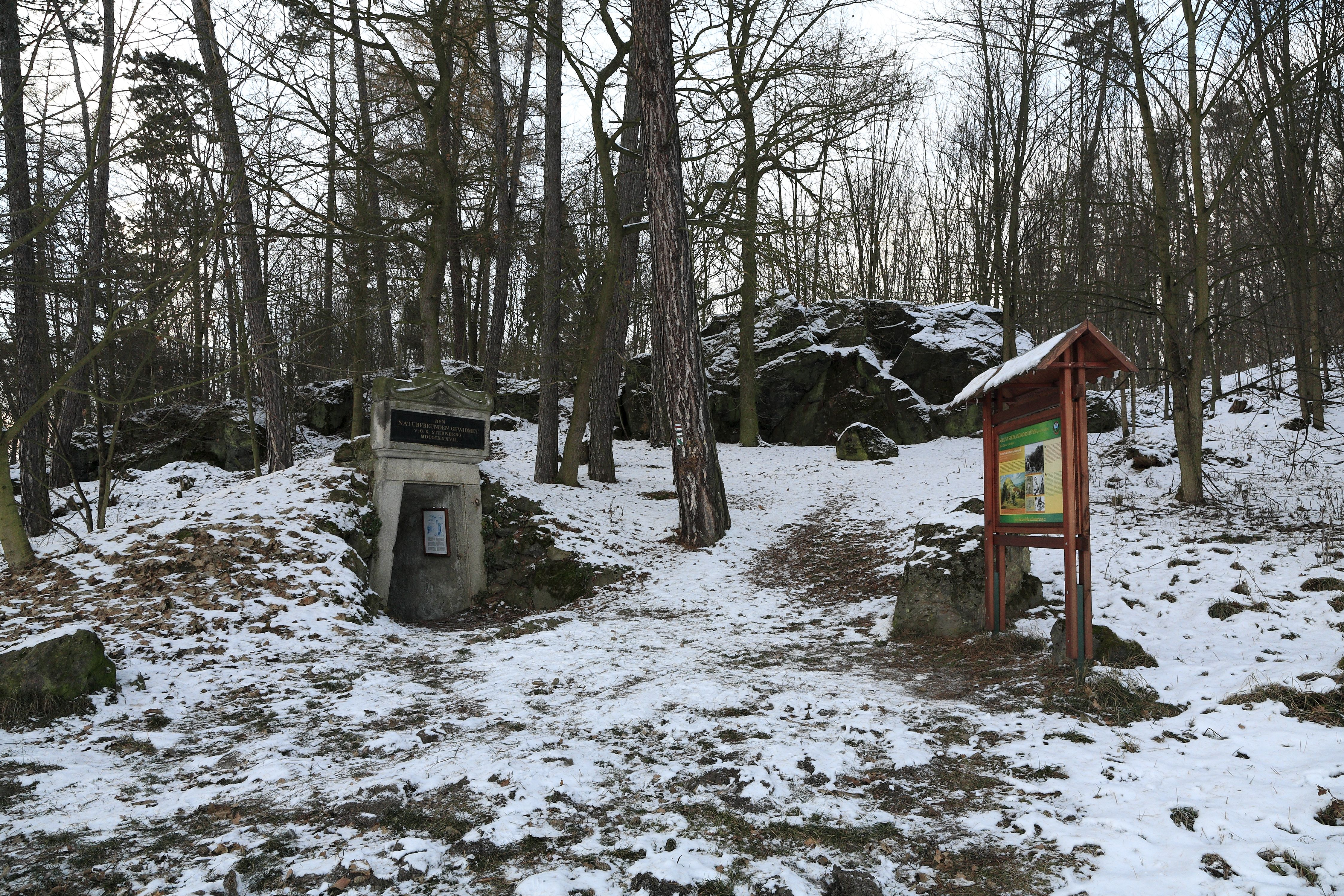 Von Süden mit Blick zum Gipfel. Der Erkundungsstollen ist nur noch auf wenigen Metern begehbar.